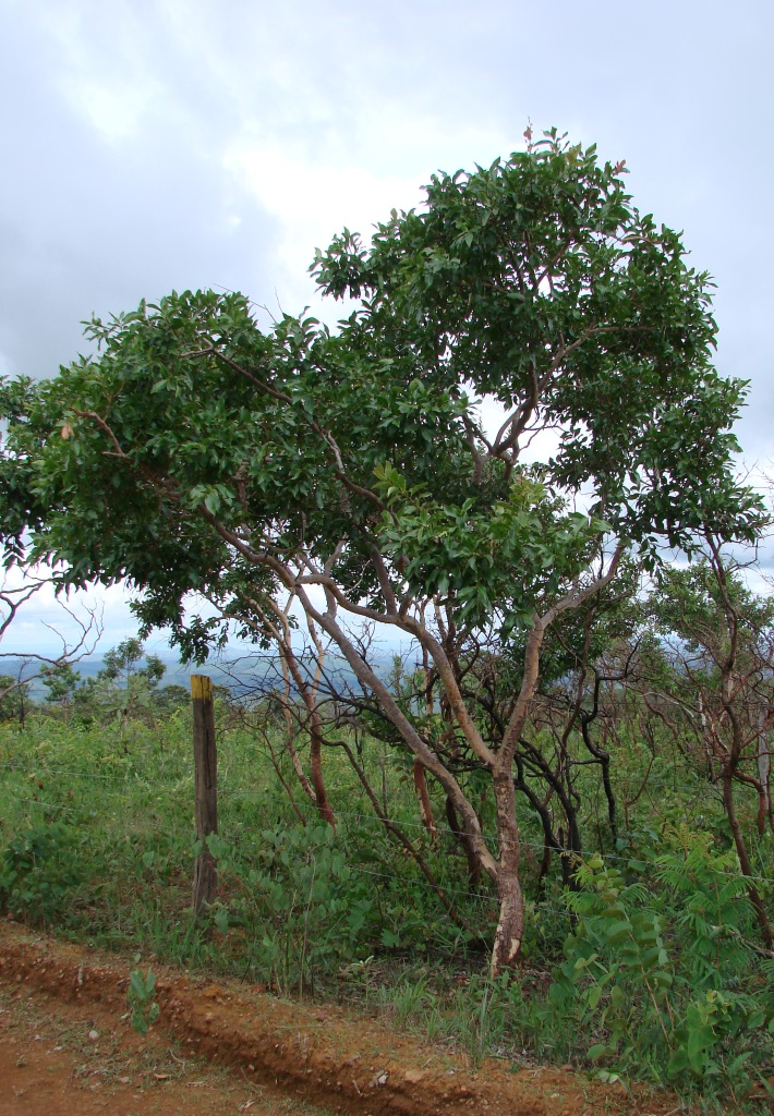 Psidium myrtoides O.Berg - tem como sin. het.: P. corynanthum (Kiaersk.) Burret ; P. myrsinoides O.Berg; P. turbinatum Mattos - MYRTACEAE - Chapada Imperial - Distrito Federal - Brasil.